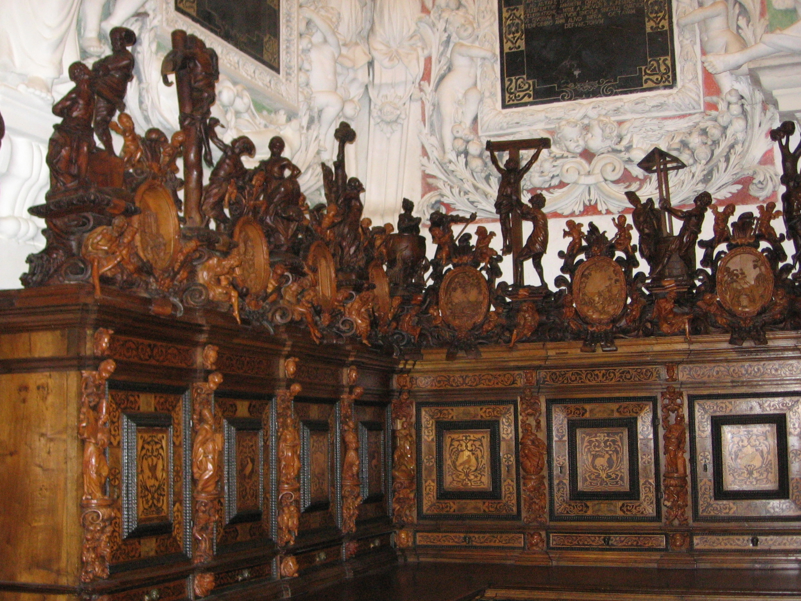 Museo le Sagrestie, Alzano Lombardo, BG (ITALIA)